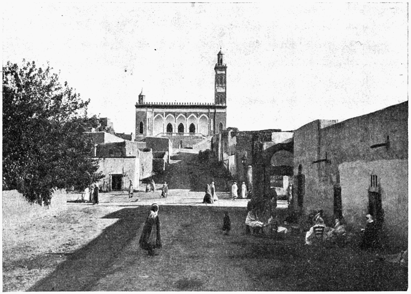 une rue de laghouat